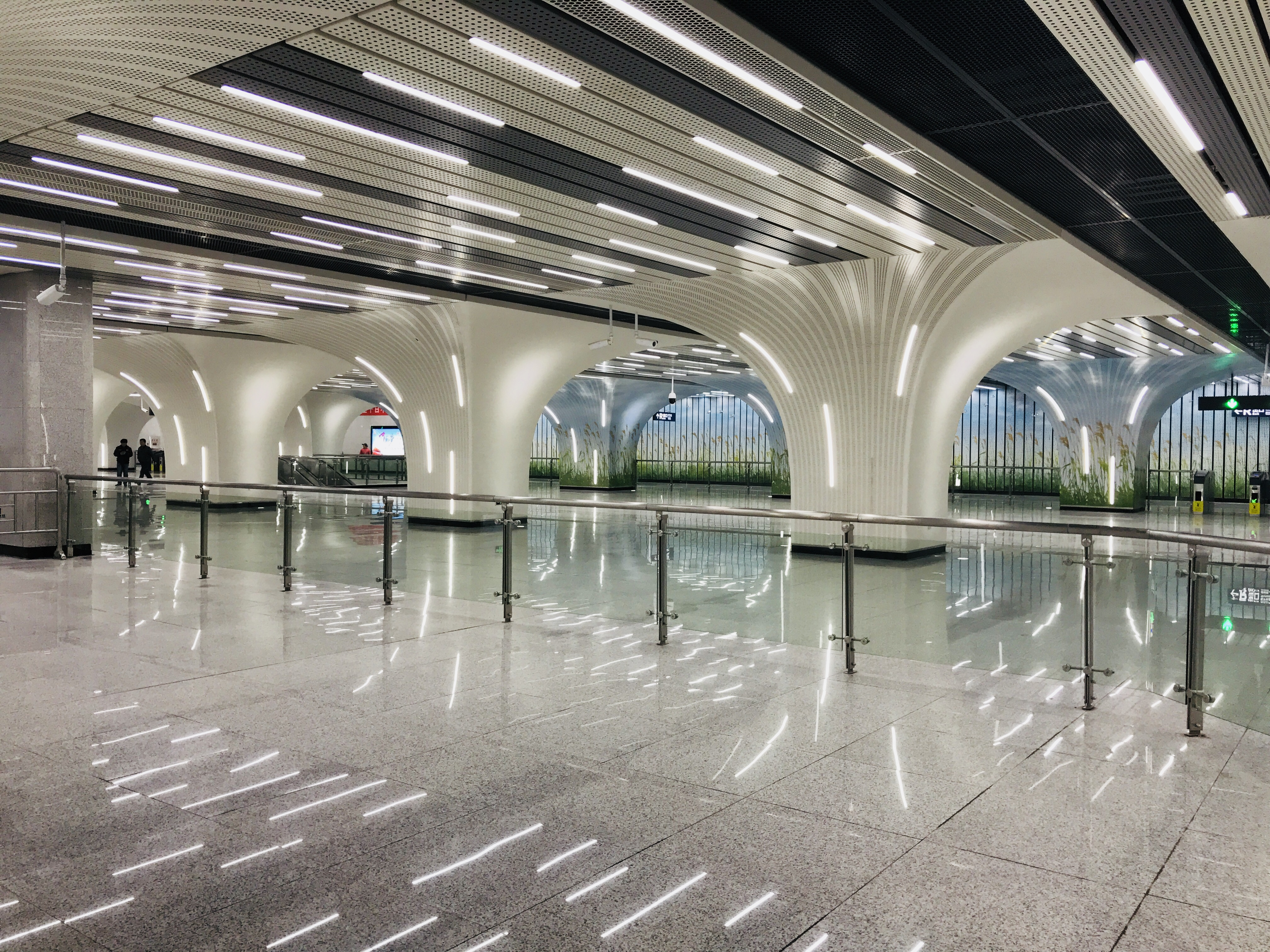 武汉轨道交通8号线徐家棚站站厅